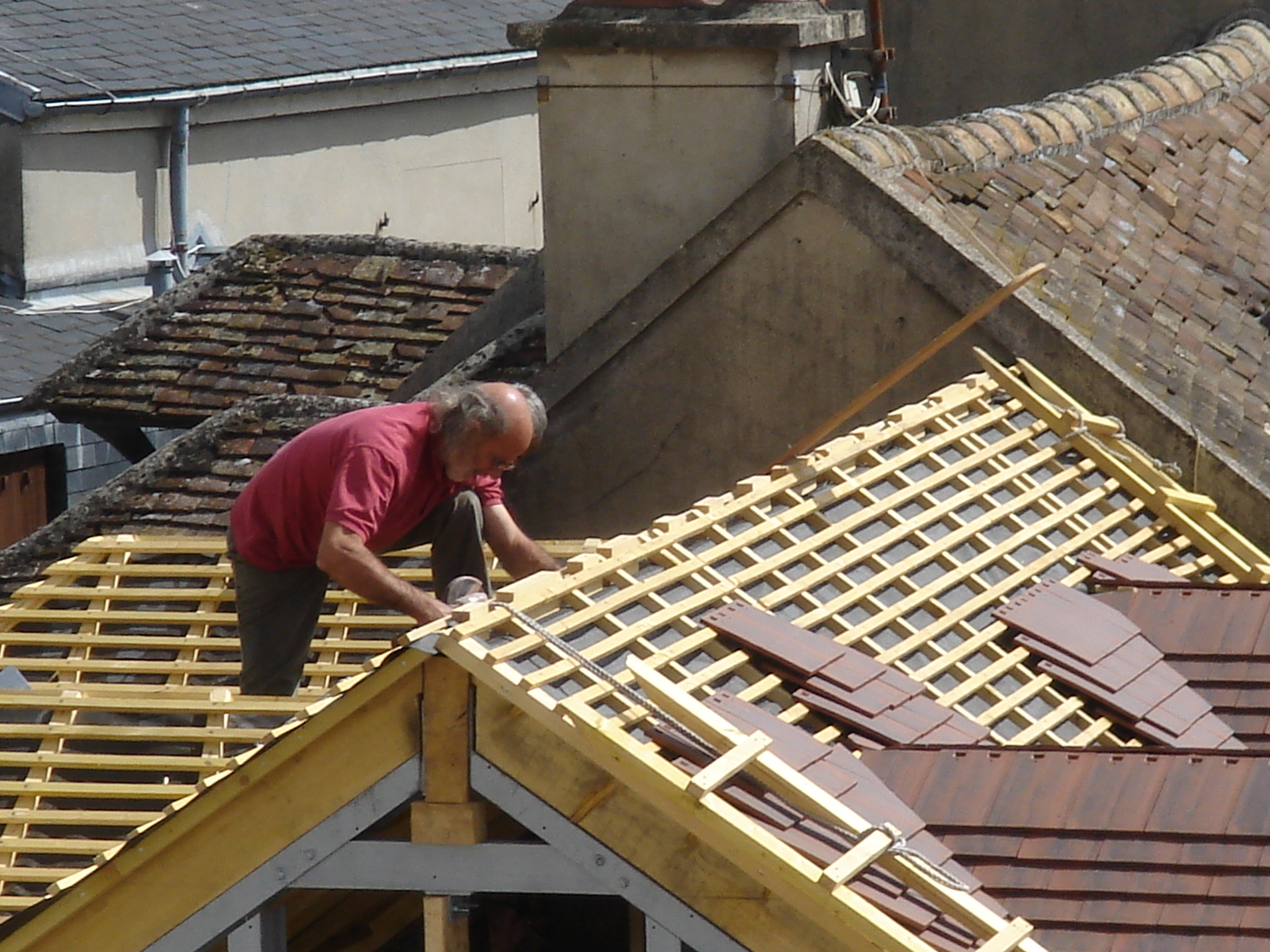 Couvreur travaillant à la construction d'une maison neuve à Paris, en France.